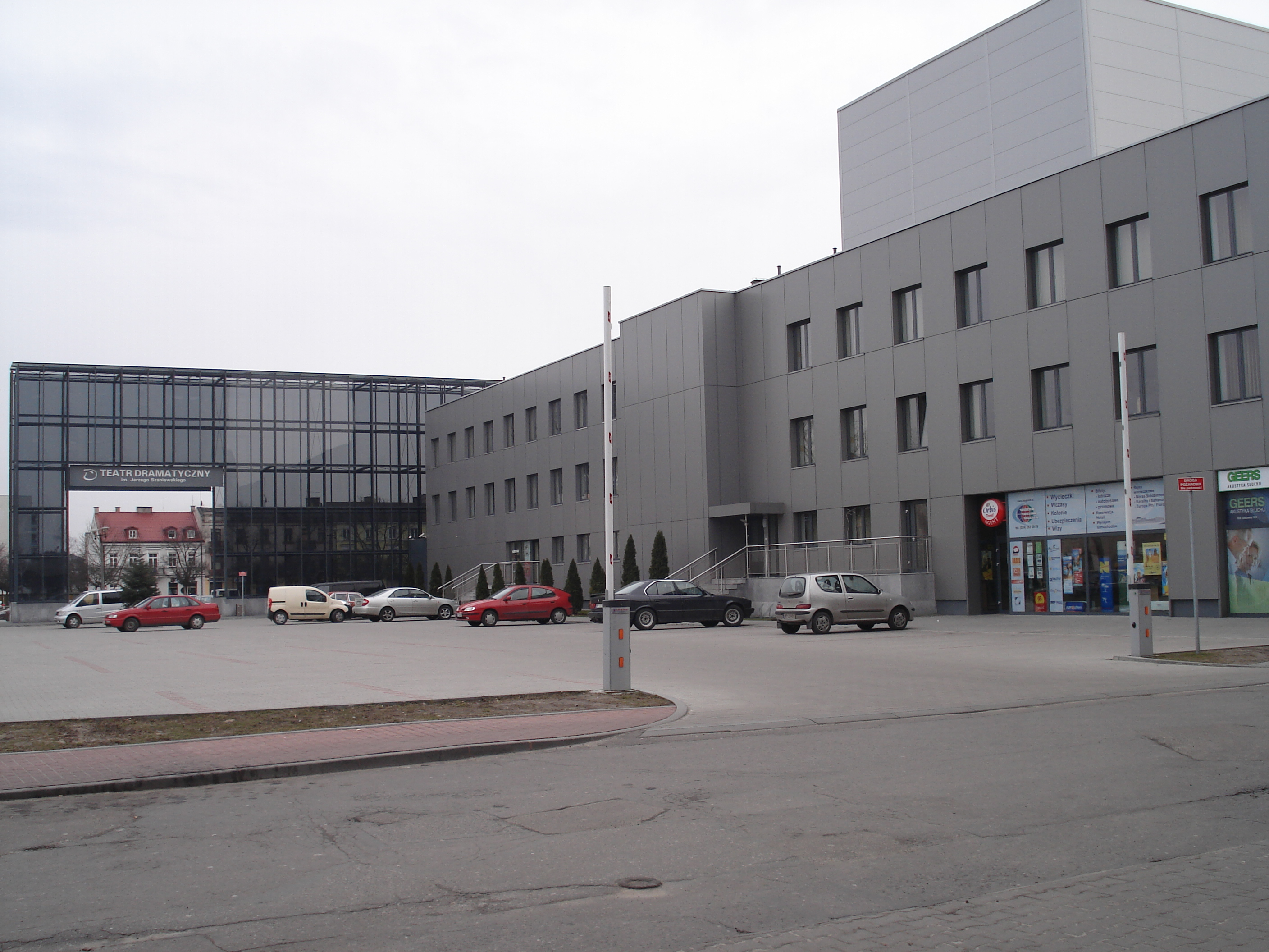 Płock, Nowy Rynek 11 - gmach Teatru Dramatycznego im. Jerzego Szaniawskiego.